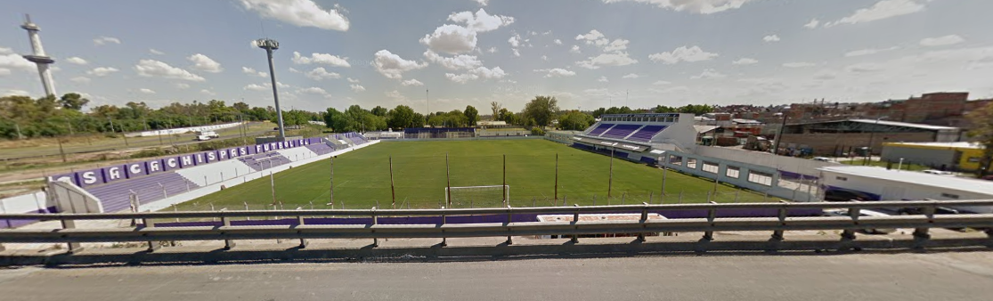 Estadio de Sacachispas FC